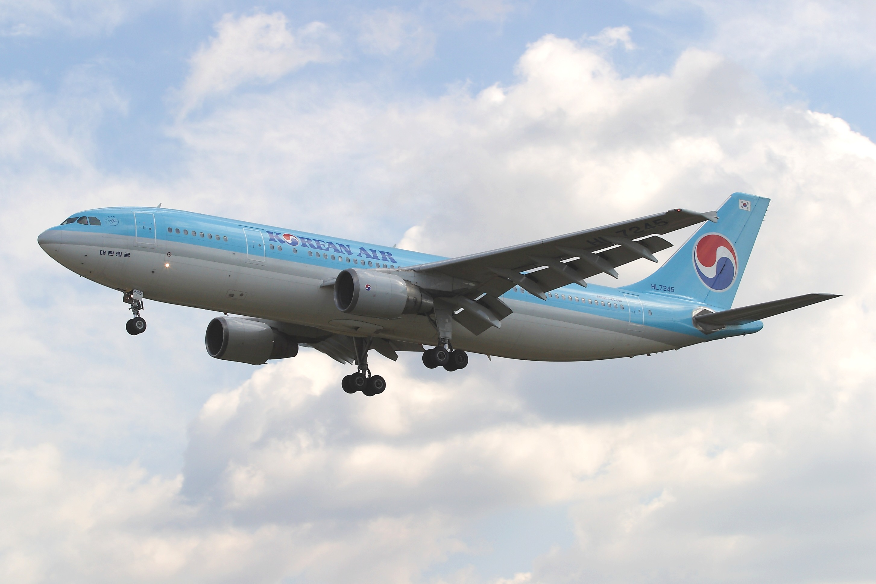 大韓航空 エアバス A300 福岡空港